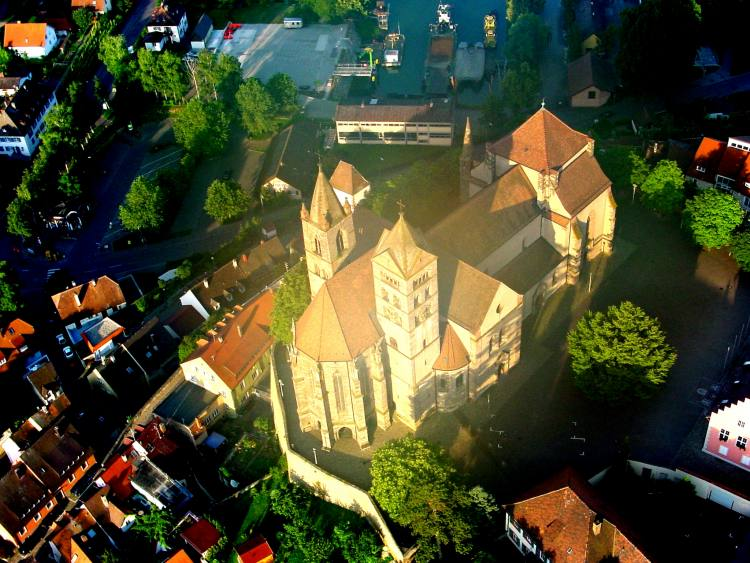 Luftbild vom Breisacher Münster, aufgenommen bei einer Ballonfahrt im Juli 2003 Weitere Luftbilder von Breisach